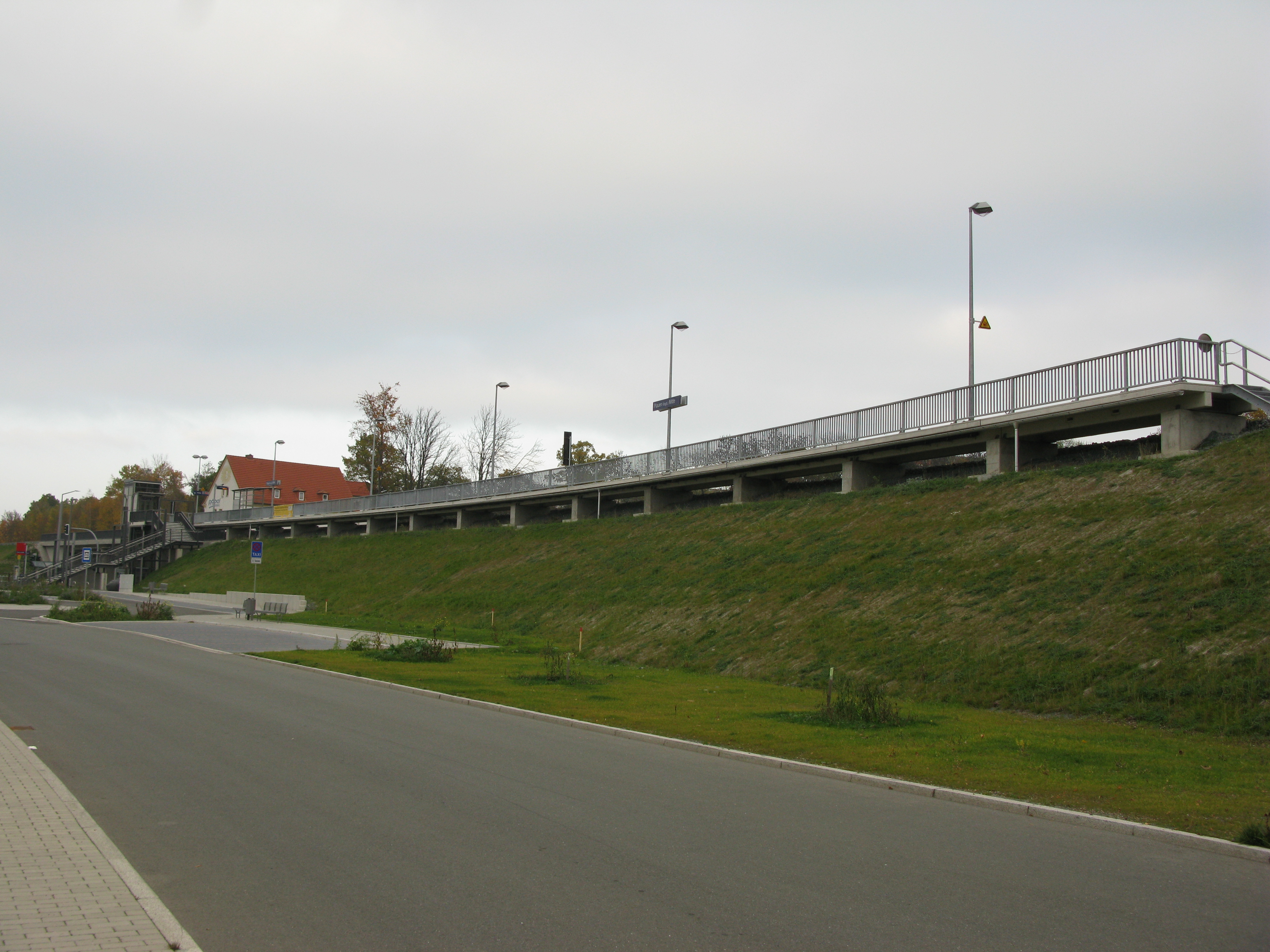 Bahnhof Mitte (auch Plauen (Vogtl.) Mitte): Umsteigepunkt zwischen Regionalbahn (Elstertalbahn), Straßenbahn, Bussen und PKW. Der Bahnsteig der Elstertalbahn.